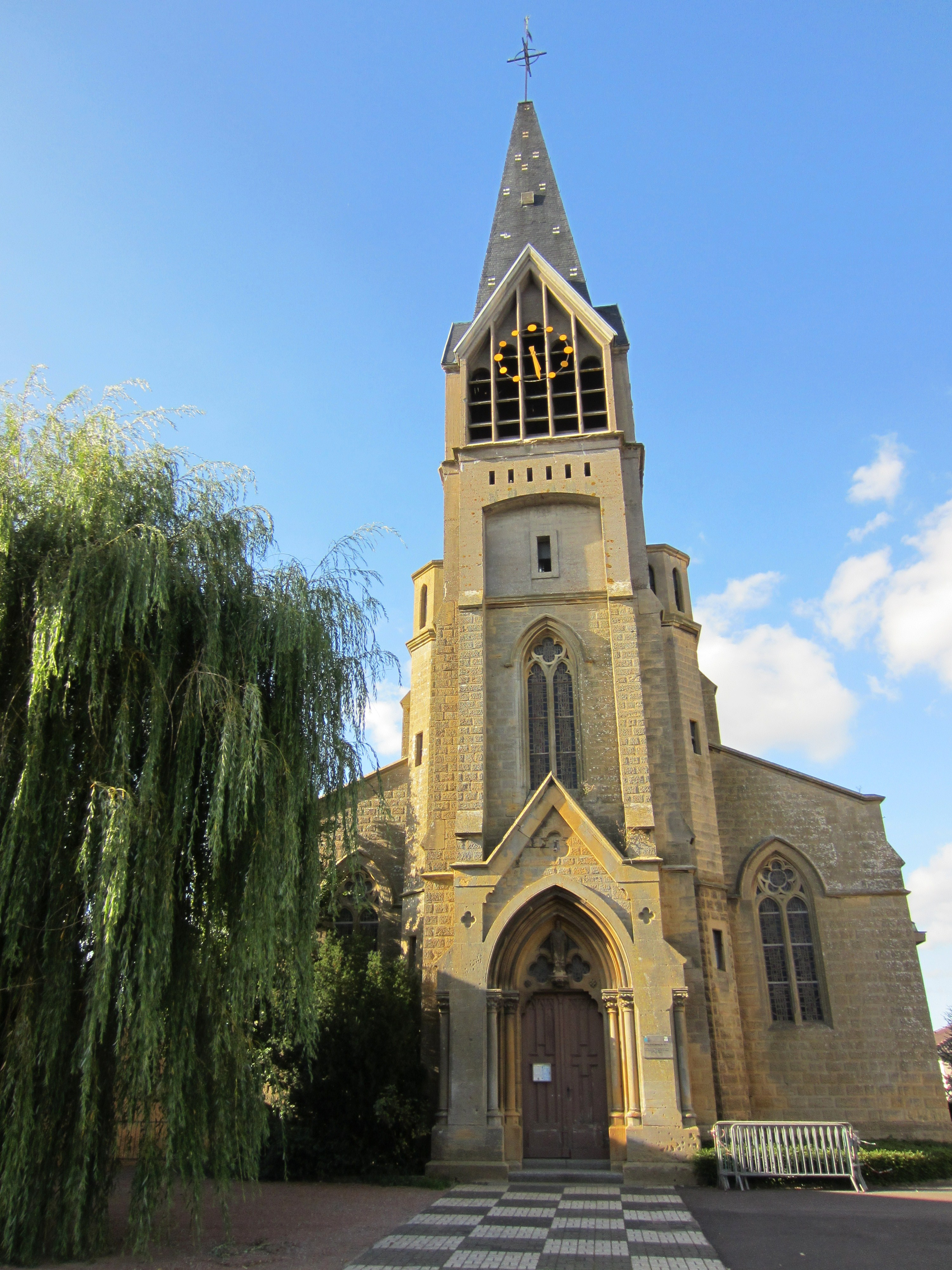 Description eglise saint Clement Amanvillers Date14 September 2011Sourcemon appareil photoAuthorAimelaimePermission (Reusing this file) eglise saint Clement Amanvillers